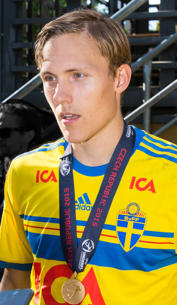 Ludwig Augustinsson och U21-mästarna firas i Kungsträdgården i Stockholm den 1 juli 2015.